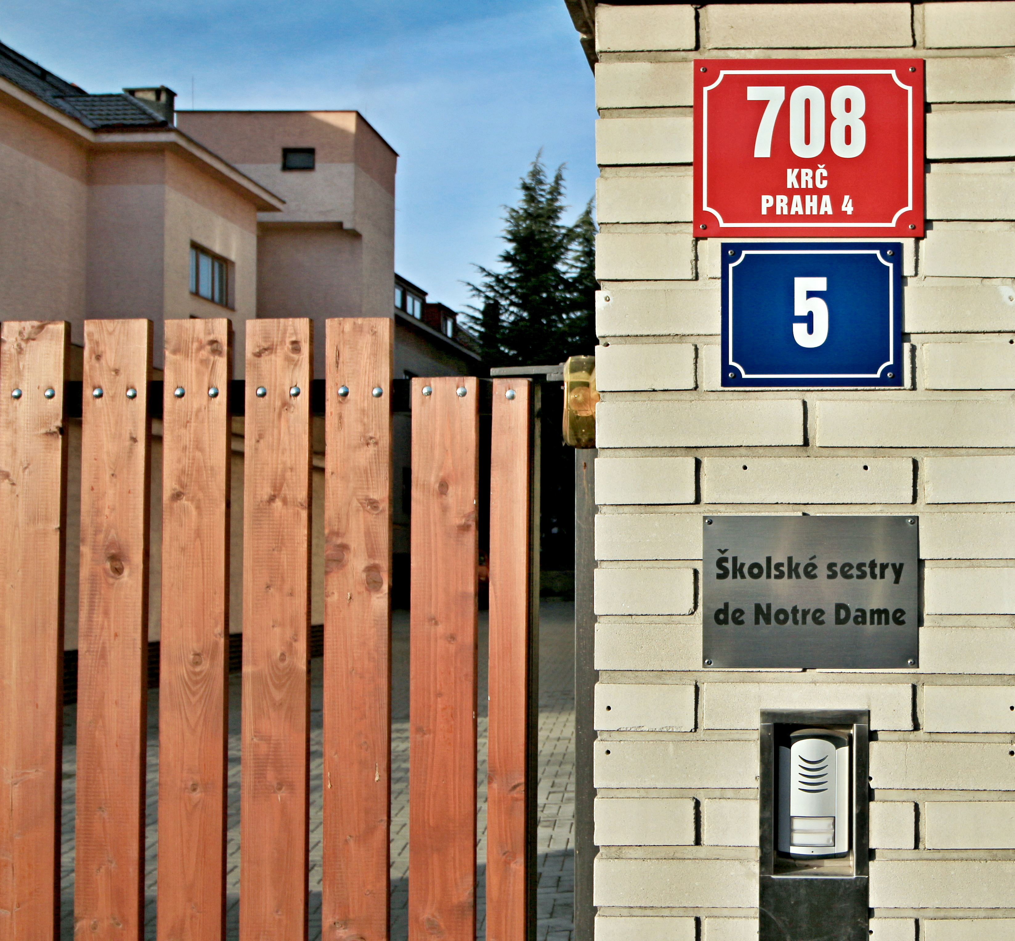 Škola sv. Augustina v Praze